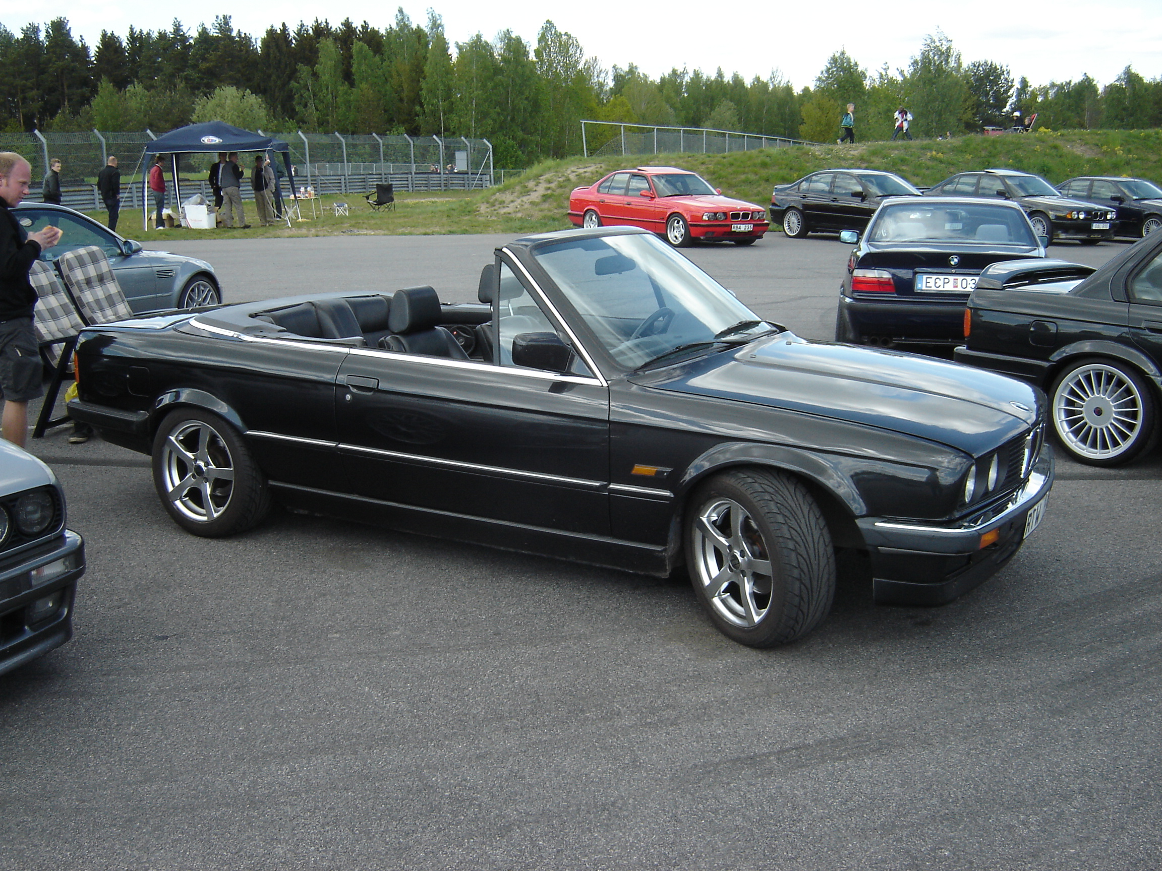 BMW 325i Cabriolet